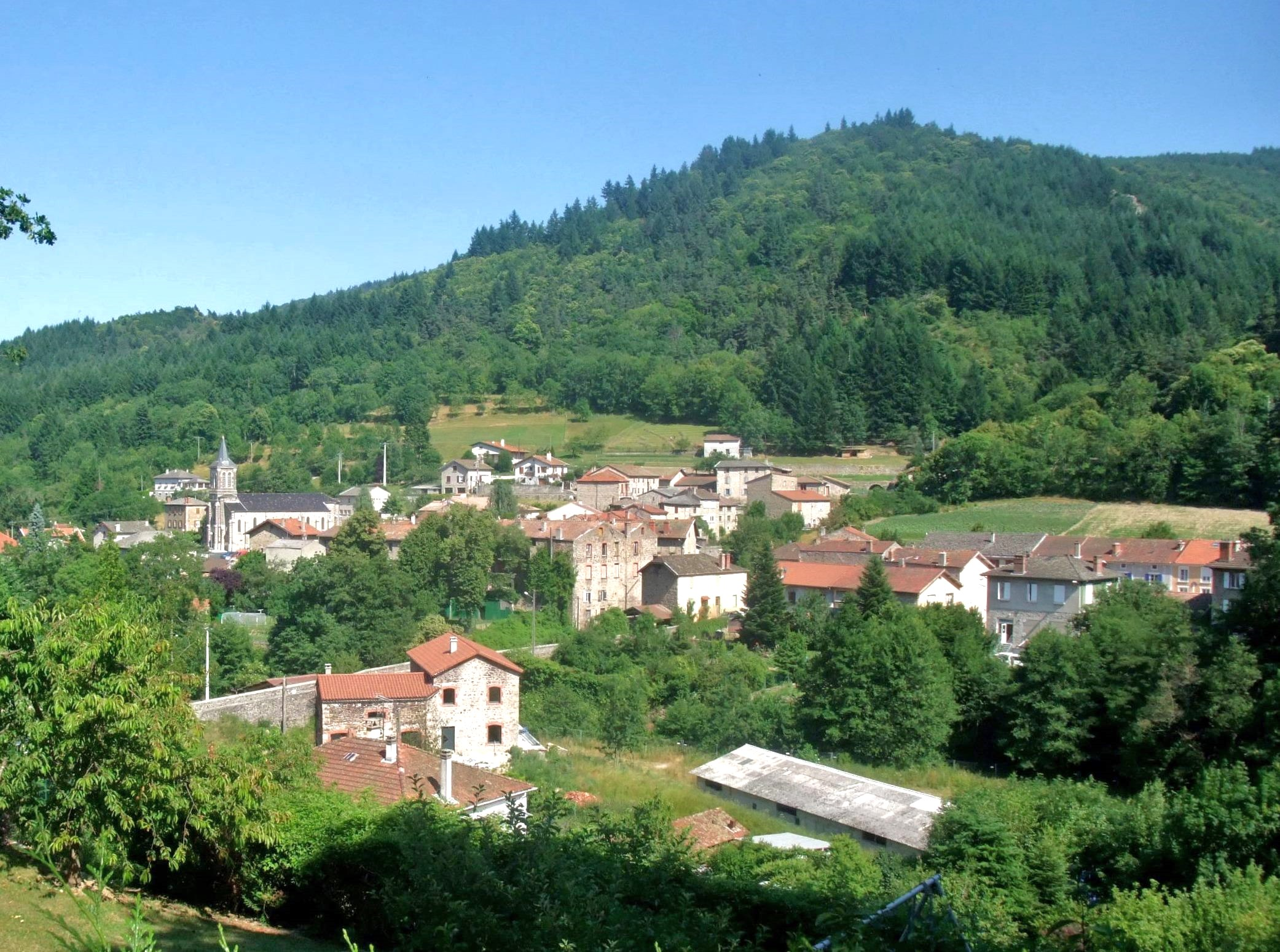 Vocance vue générale